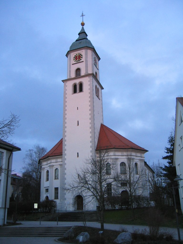 Pfarrkirche St. Verena in Bad Wurzach selbst fotografiert am 2. März 2007